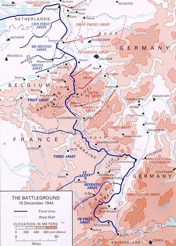 Source: US ARMY License: US Government document. Printed by the Government printing office. Assumed public domain.